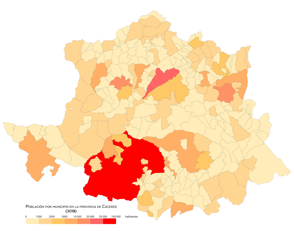 Mapa de población por municipio en la provincia de Cáceres en 2018.